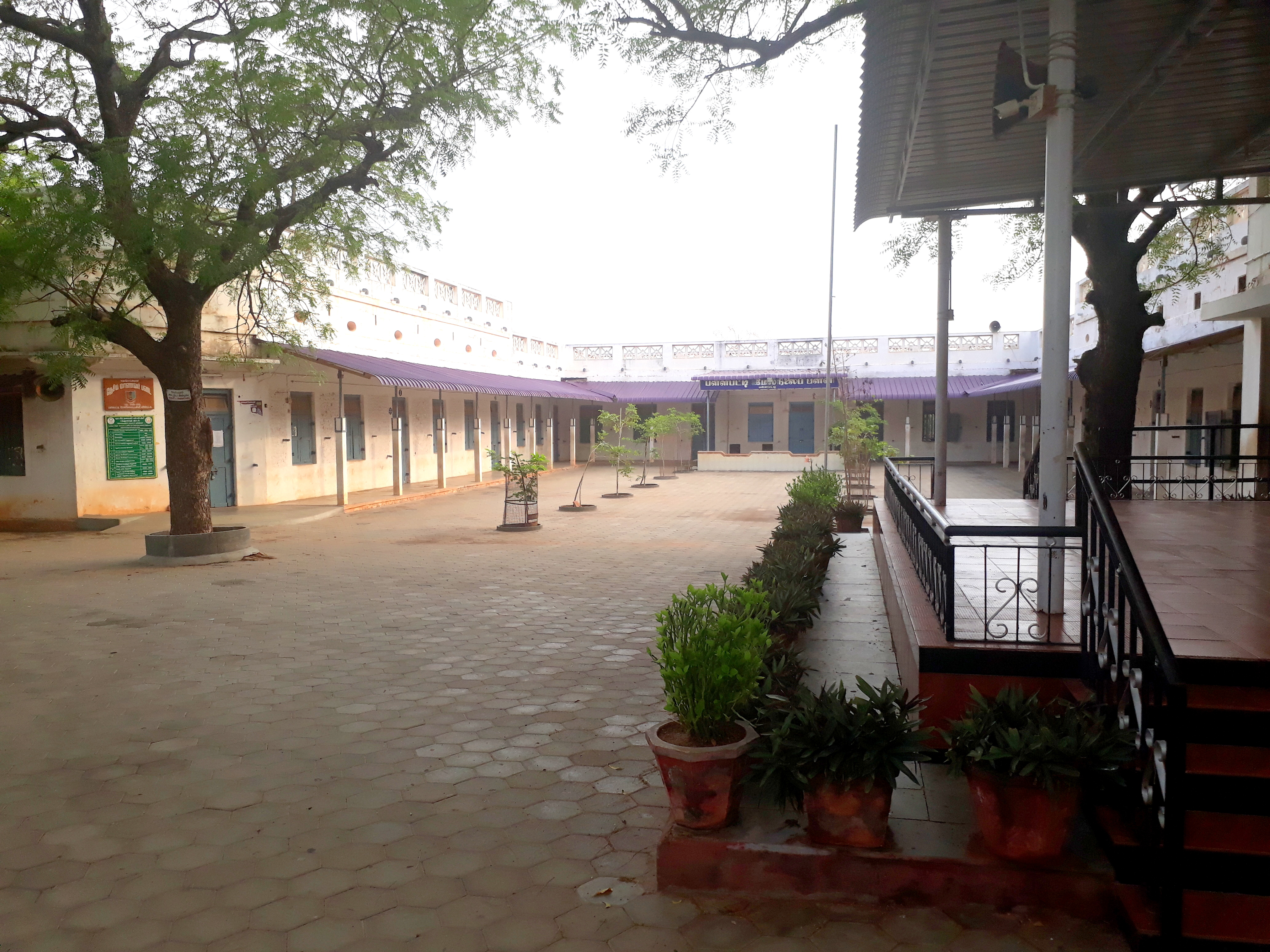 பள்ளபட்டி மேல்நிலைப் பள்ளி